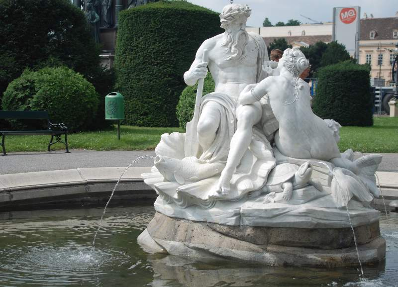 Brunnen B (Naturhistorisches Museum / Burgring, Anton Schmidgruber): Die insgesamt vier Tritonen- und Najadenbrunnen bilden die Zentren der vier großen Rasenflächen, welche durch die Hauptverbindungswege des Maria-Theresien-Platzes gebildet werden. Errichtet wurden die Brunnen in den Jahren 1887 bis 1890.